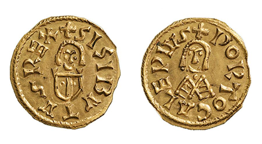 Imitación moderna (¿siglo XX?) de un tremis visigodo de oro acuñado en Oporto ("Portocale") durante el reinado de Sisebuto. Leyendas: anverso "+SISIBVTVSREX", reverso "+PORTOCALEPIVS". Fuente: Ruth Pliego, La Moneda Visigoda, 2009, 1024. Conservación: EBC+.